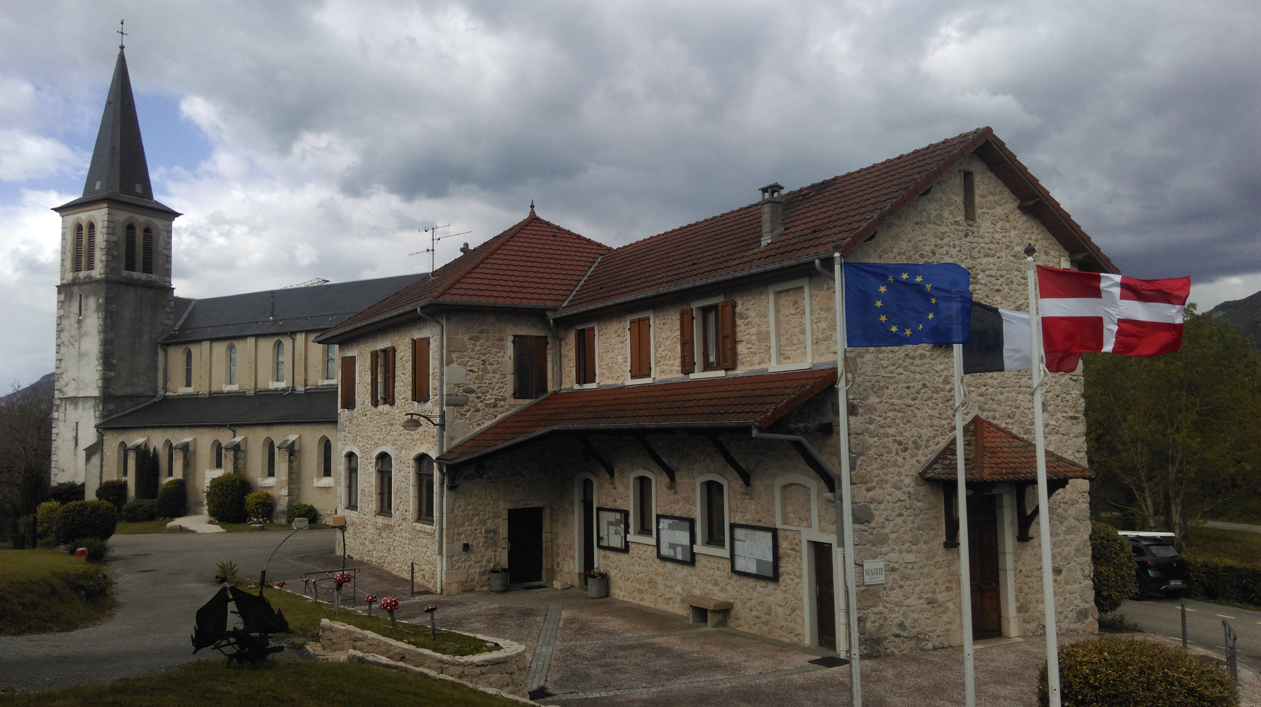 Chef lieu de Saint-Paul-sur-Yenne, Mairie et église